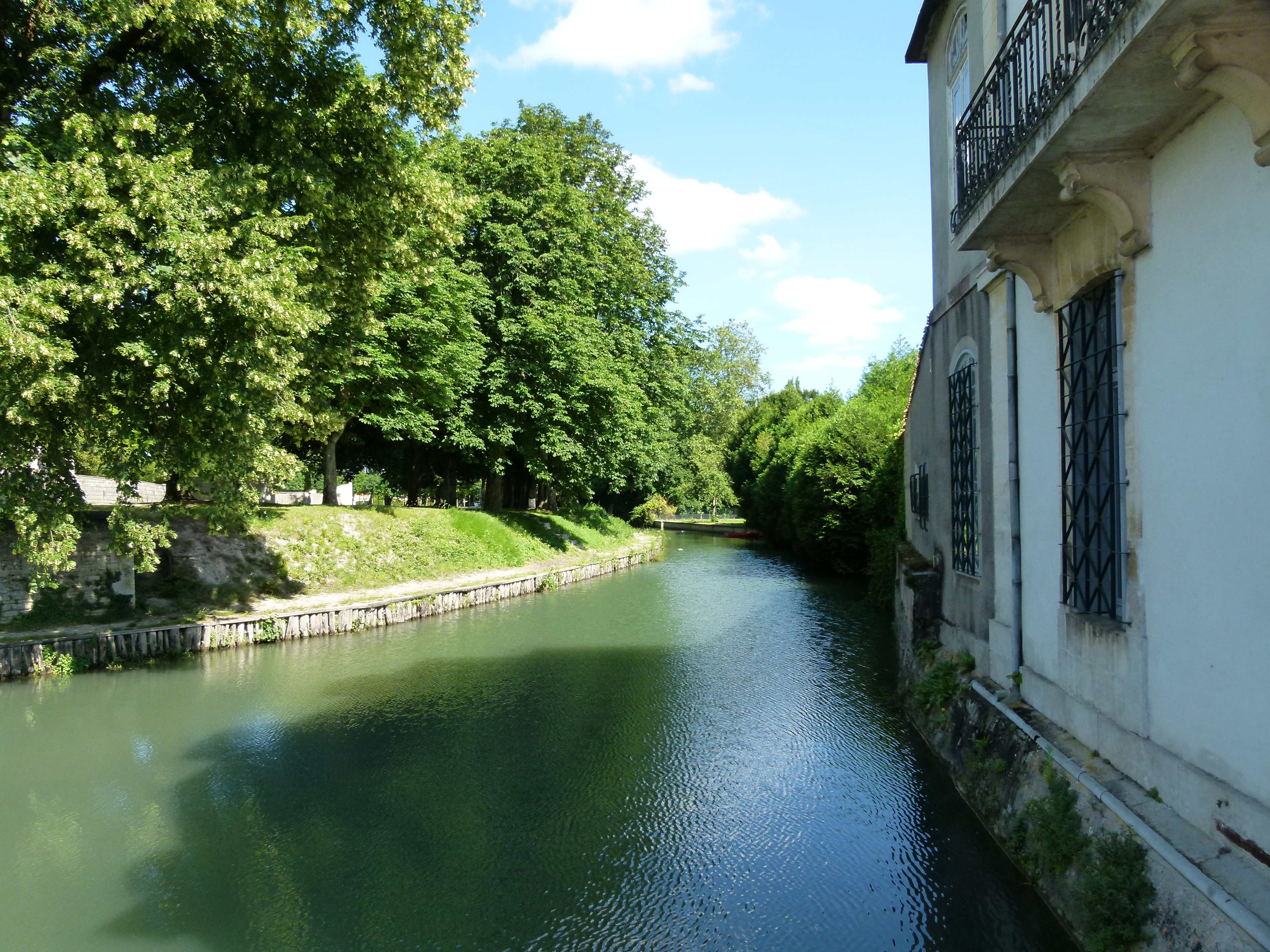 La petite rivière Gères arrose la ville et le site du château de Surgères qu'elle borde au sud.